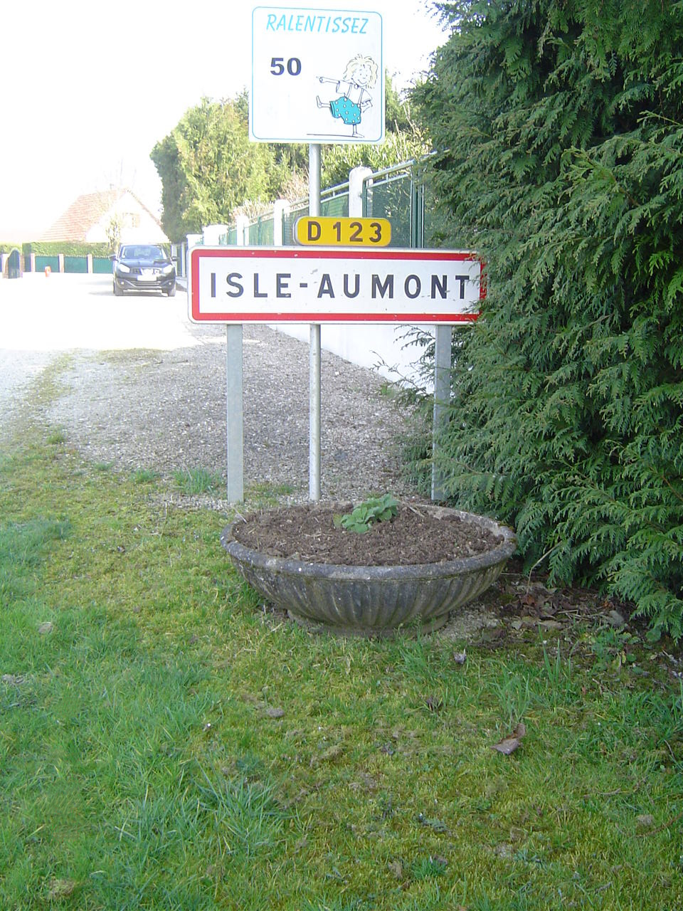 Isle-Aumont - Panneau à l'entrée du village